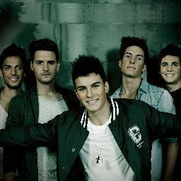 Grupo DVicio